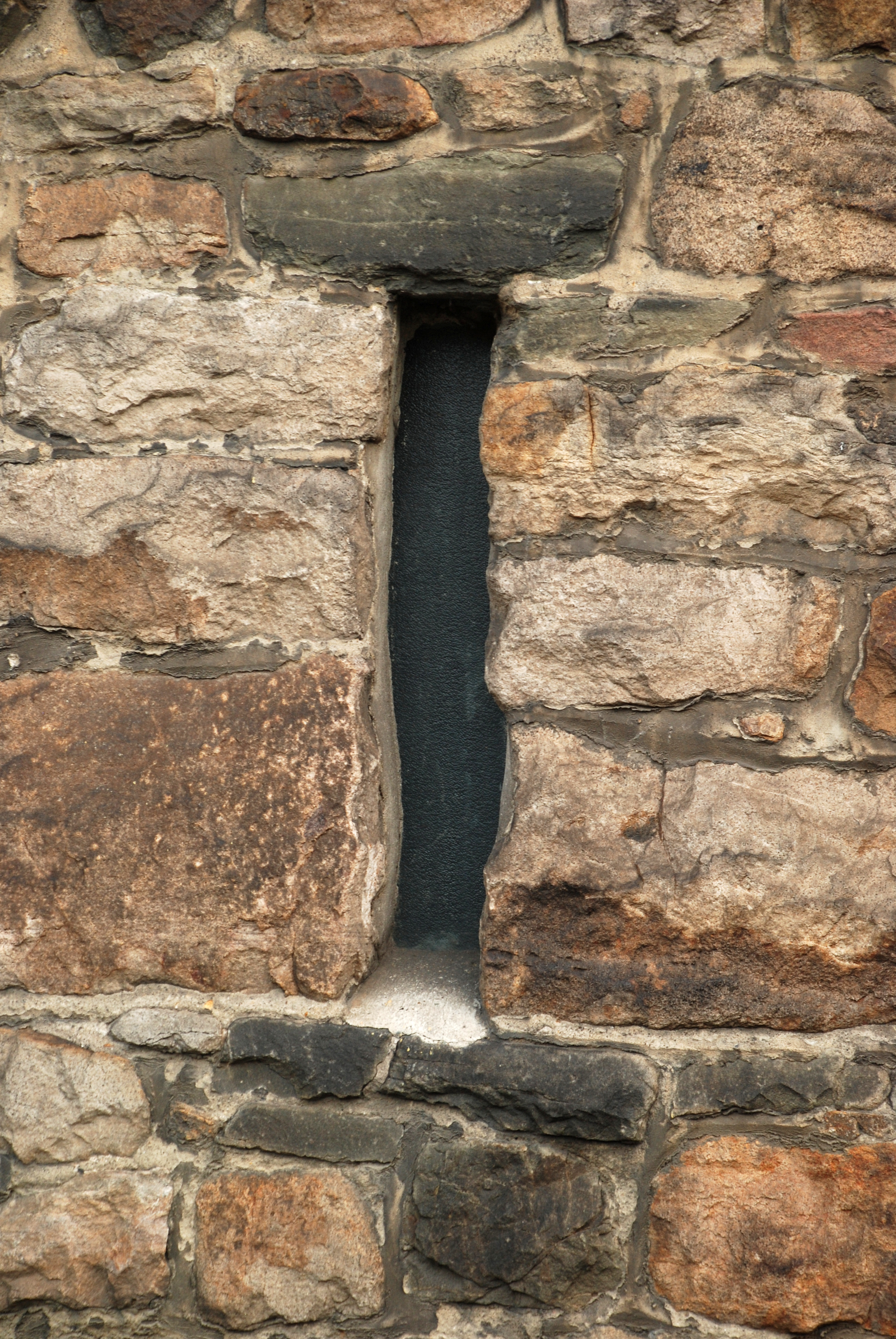 Belgique - Wallonie - Église Saints-Hermès-et-Alexandre de Theux